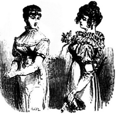 Coiffures de femmes sous la Révolution (Directoire, 1795-1799)